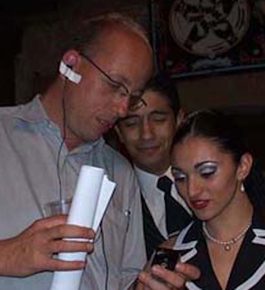 Regisseur Arne Birkenstock bei den Dreharbeiten zu "12 Tangos"